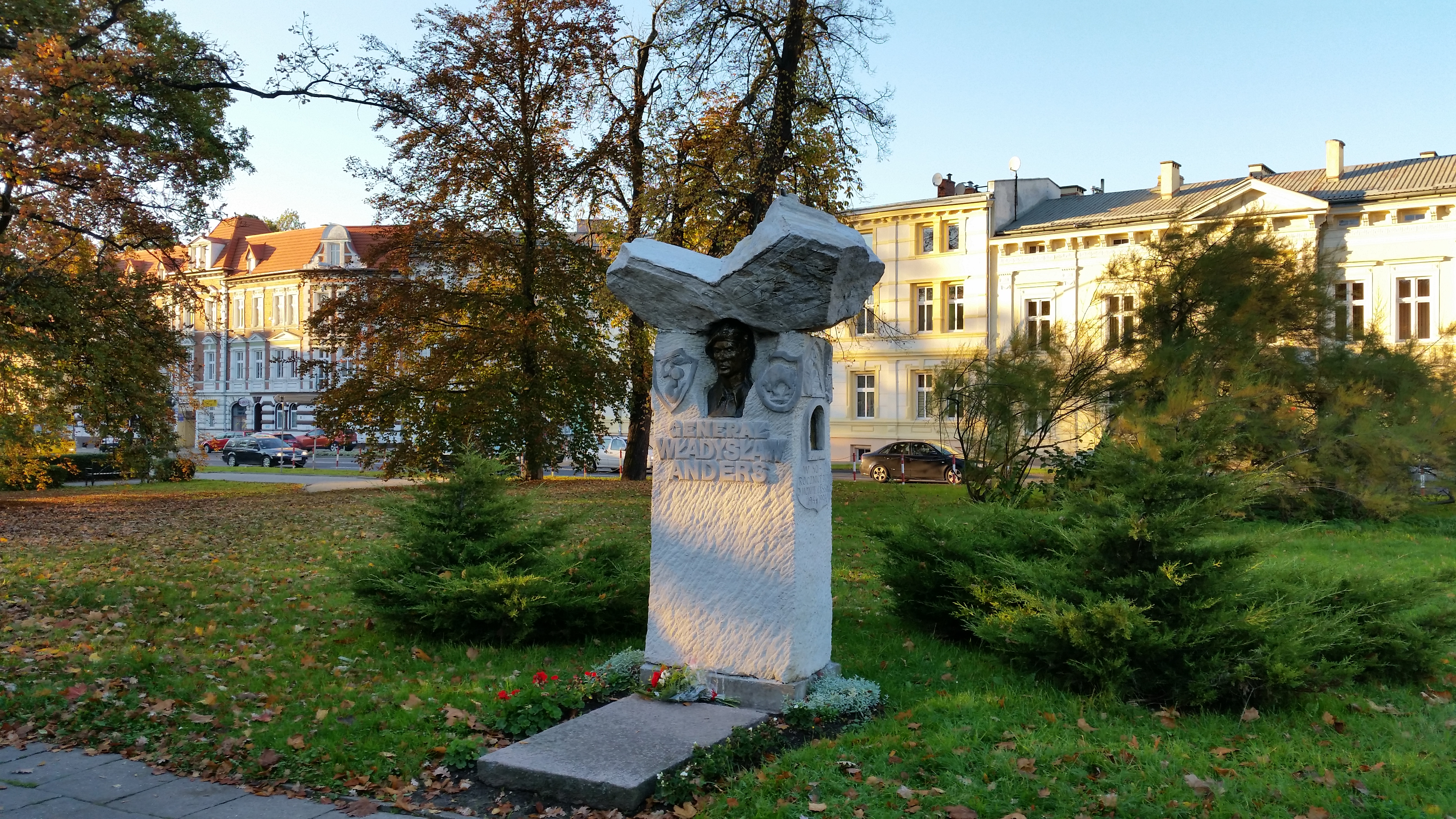 Pomnik - kolumna poświęcona gen. Władysławowi Andersowi w Koszalinie